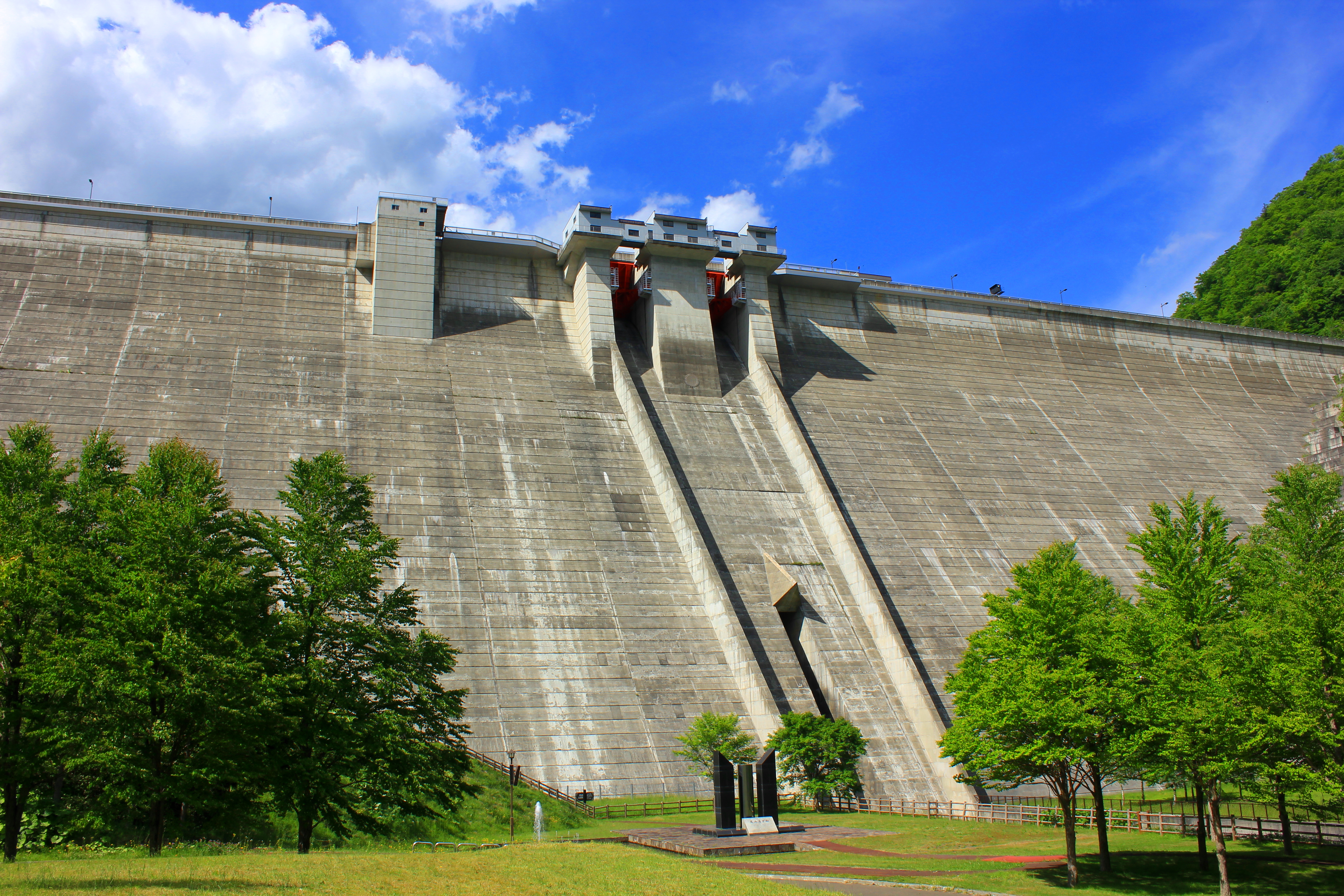 定山渓ダム（北海道・小樽内川。国土交通省北海道開発局管理）